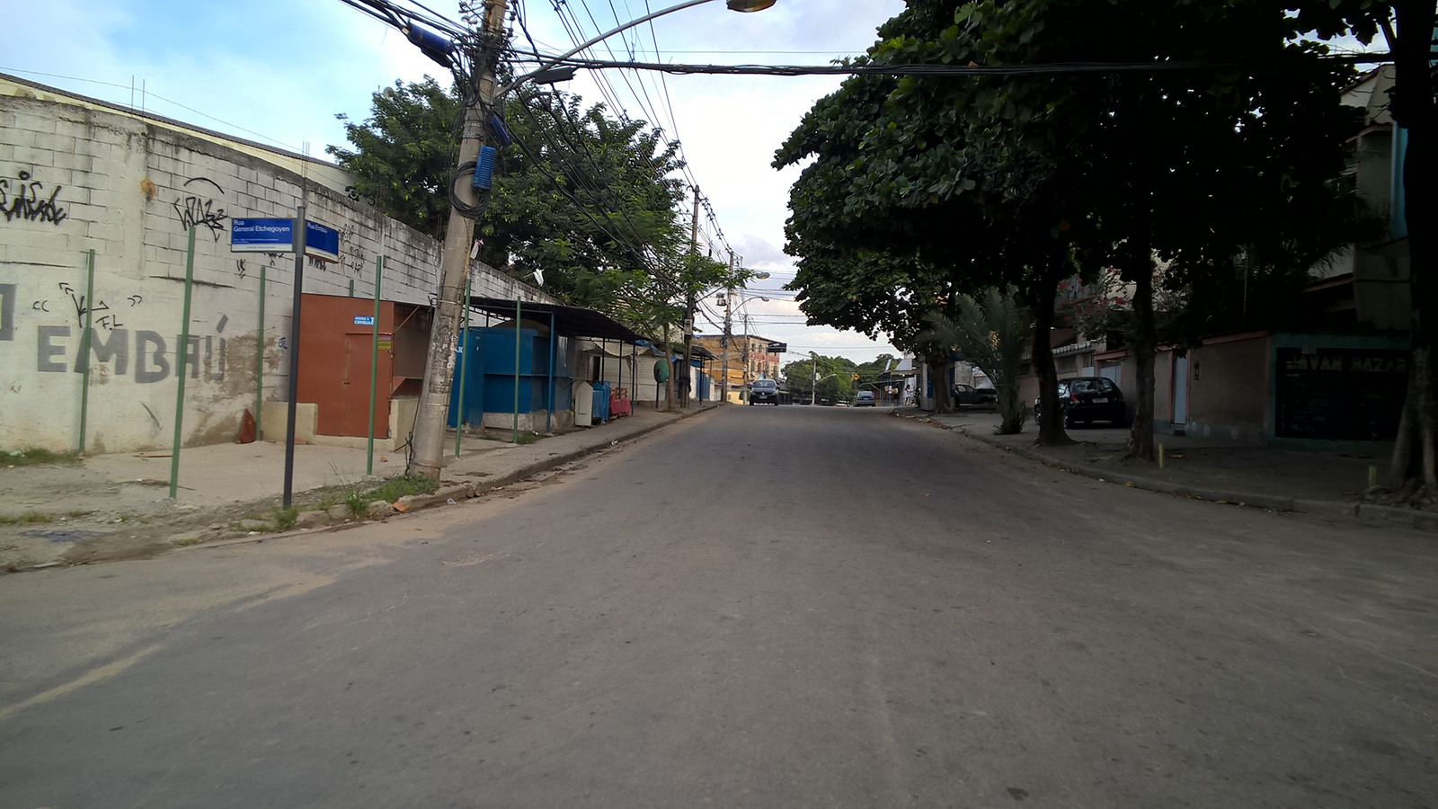 Rua Embaú.